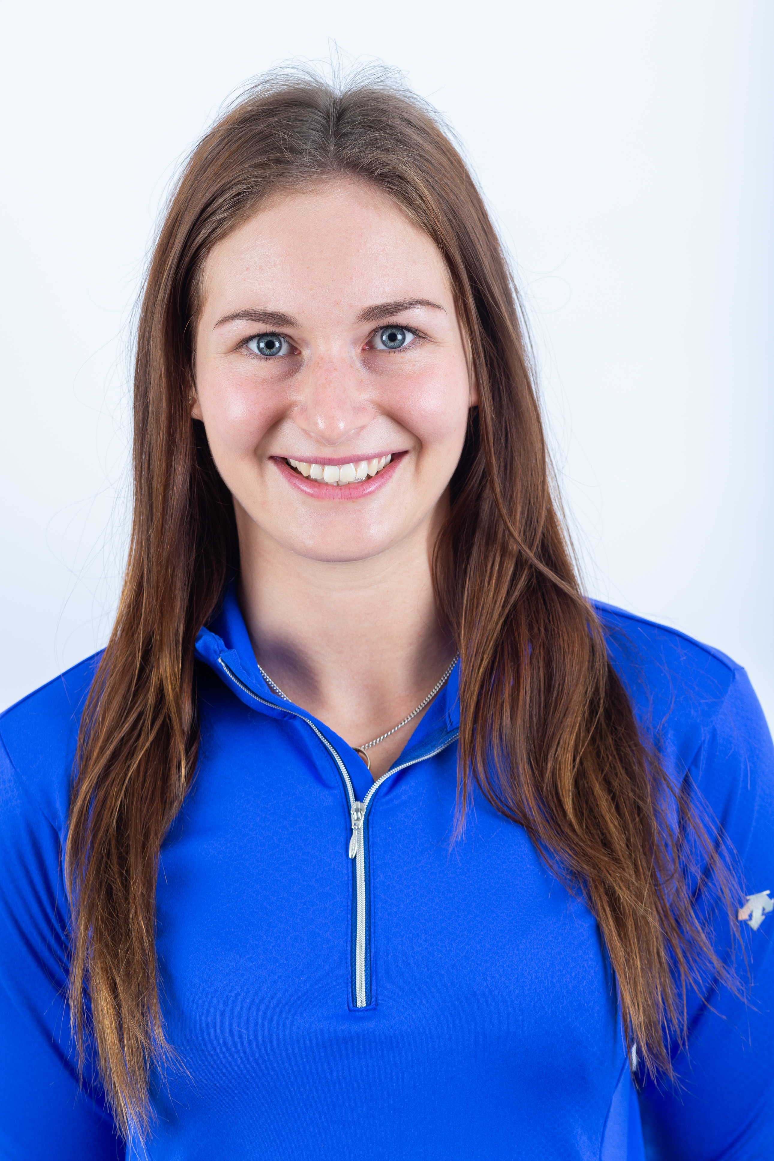 Taubitz, Julia (GER, Deutschland)